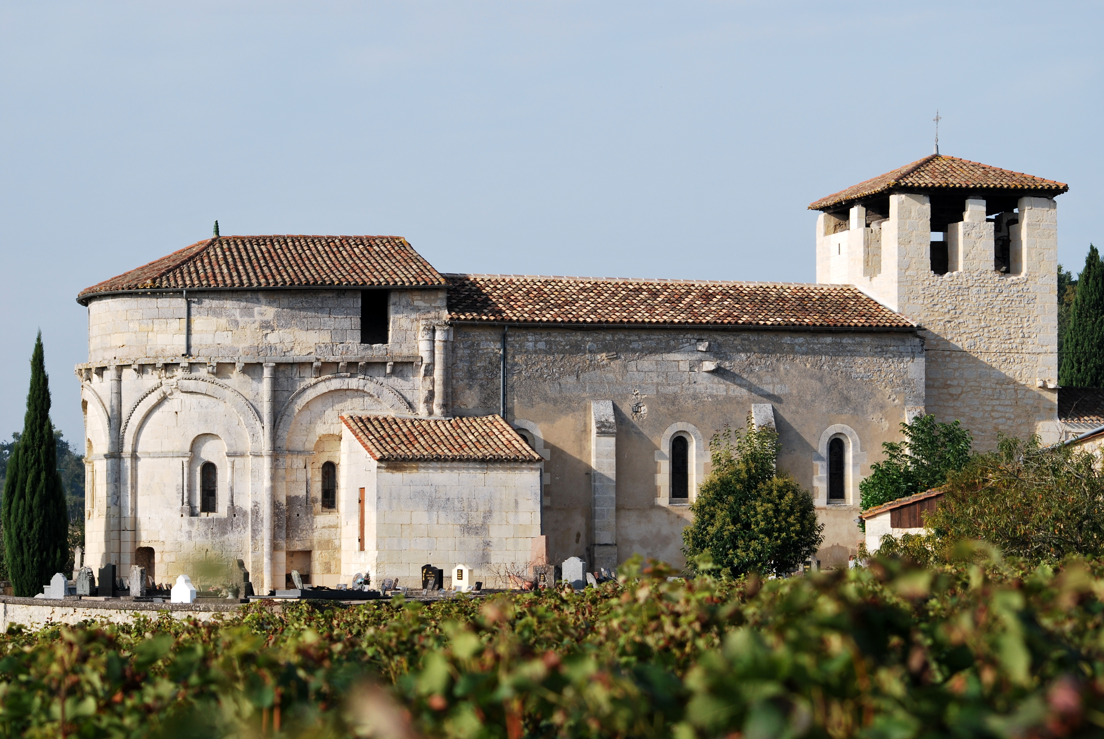 Église de Saint-Aignan .